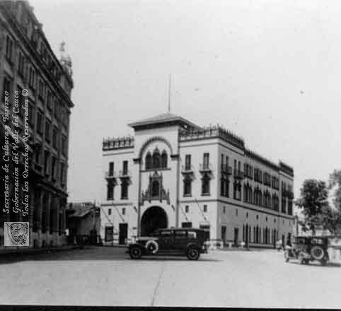 Edificio Coltabaco es uno de los más antiguos de la ciudad; esta situado en la Avenida Colombia. Esta compañía fue fundada el 27 de enero de 1919. Cali. 1930.